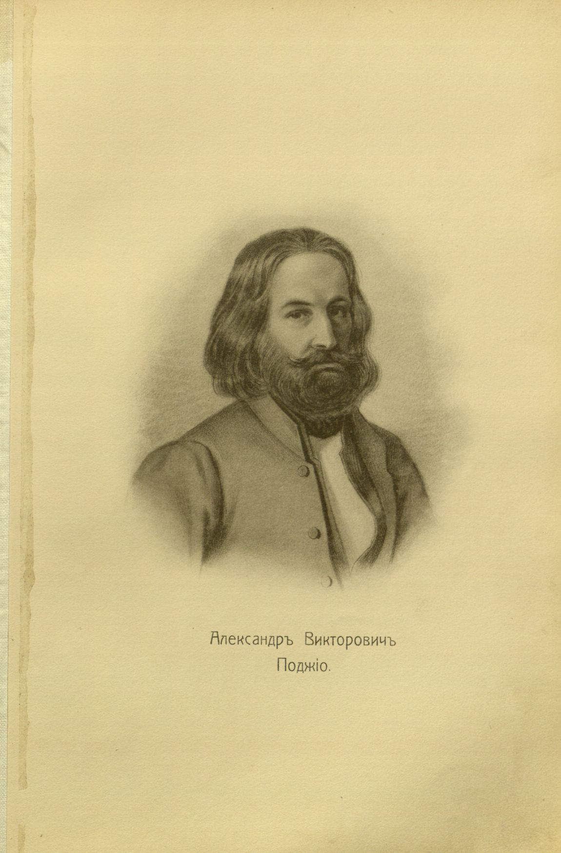 Поджио, Александр Викторович